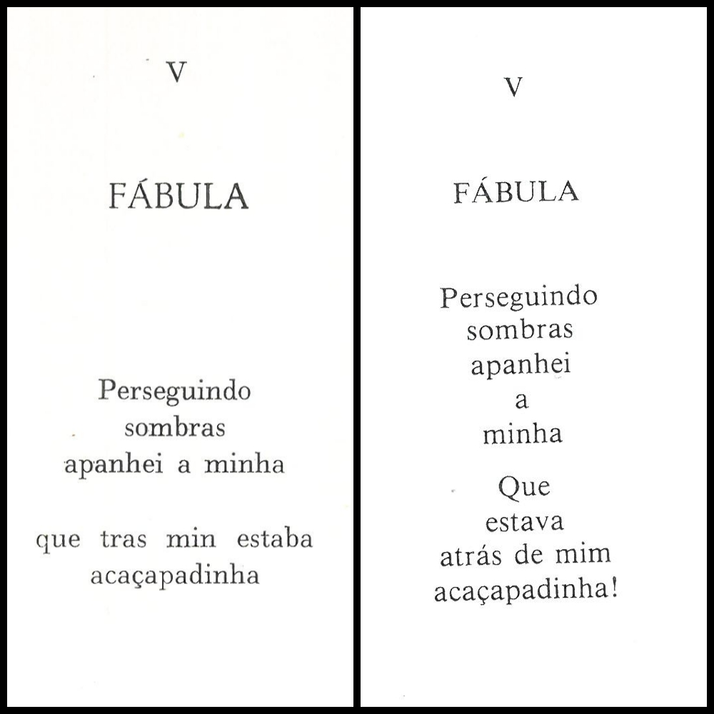 Poema de comparación entre as dúas edicións de Rio sonho e tempo